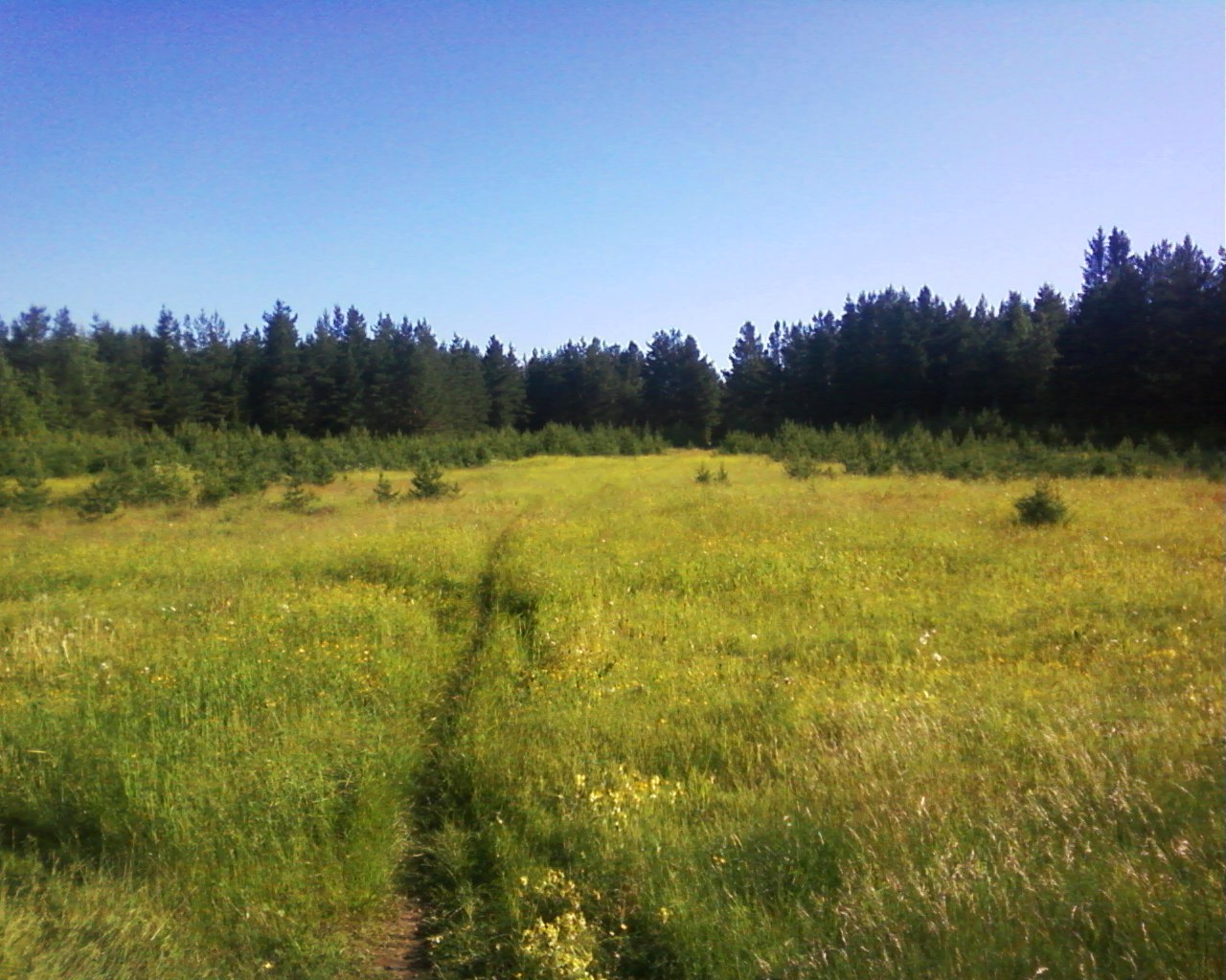 Оськина Новина